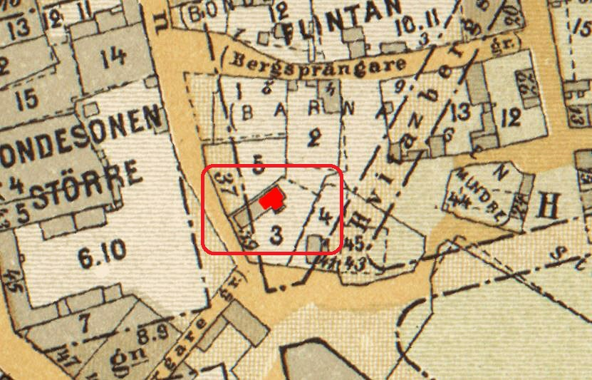 Del av karta över Stockholm visande bebyggelsen öster om Vita bergen. Röd markerad är Hasse och Tages skrivstuga.